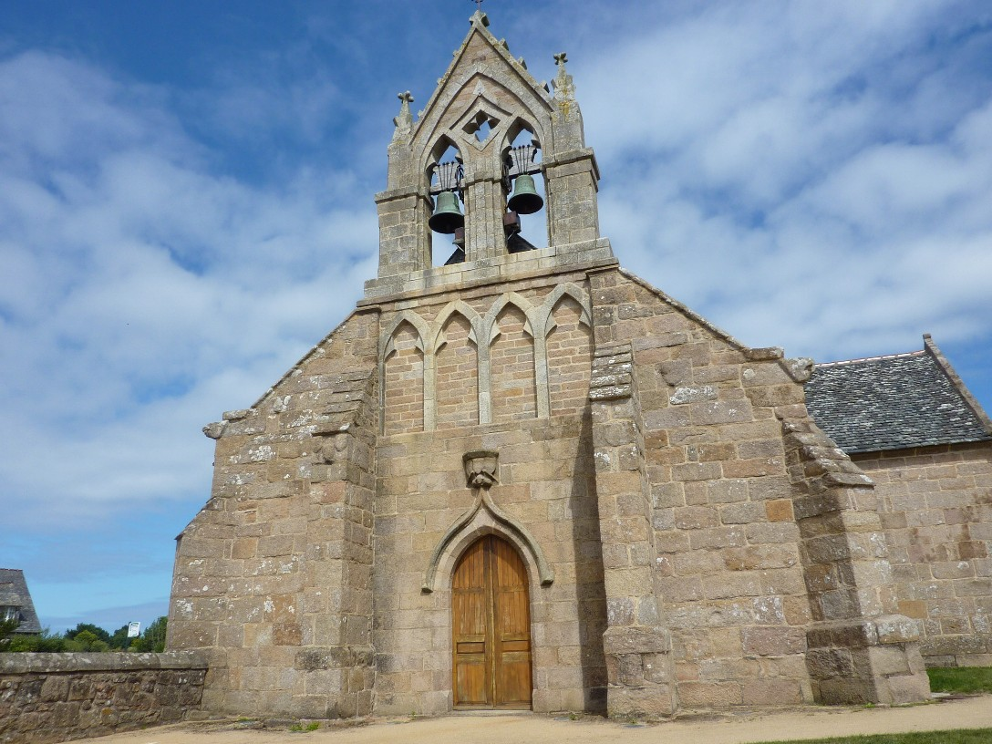 Façade église du bourg